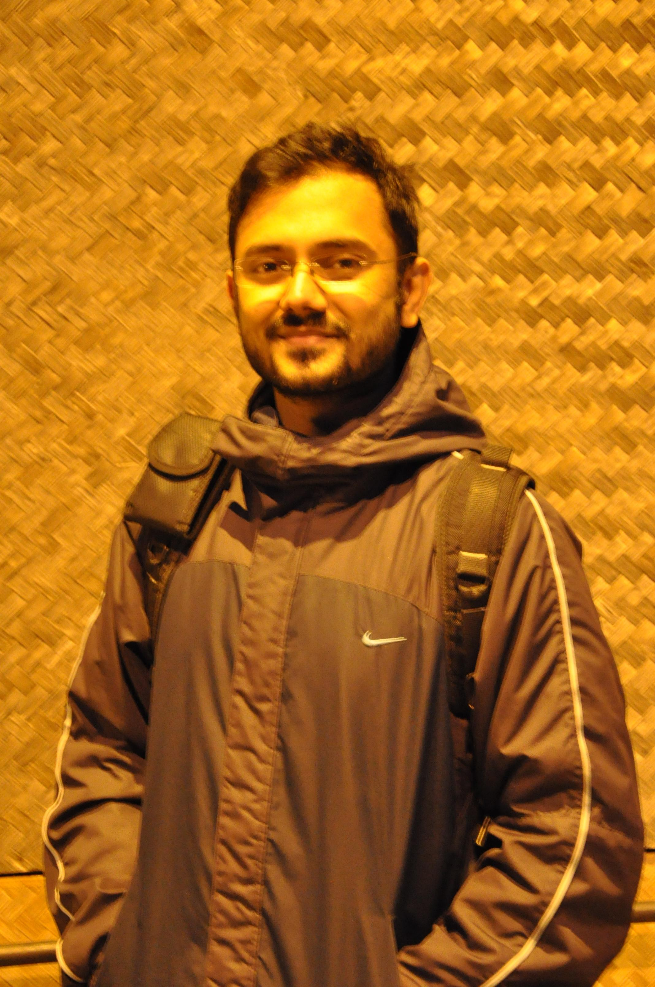 এটি বাংলাদেশের অন্যতম অভিনেতা অরুণ সাহার স্থিরচিত্র